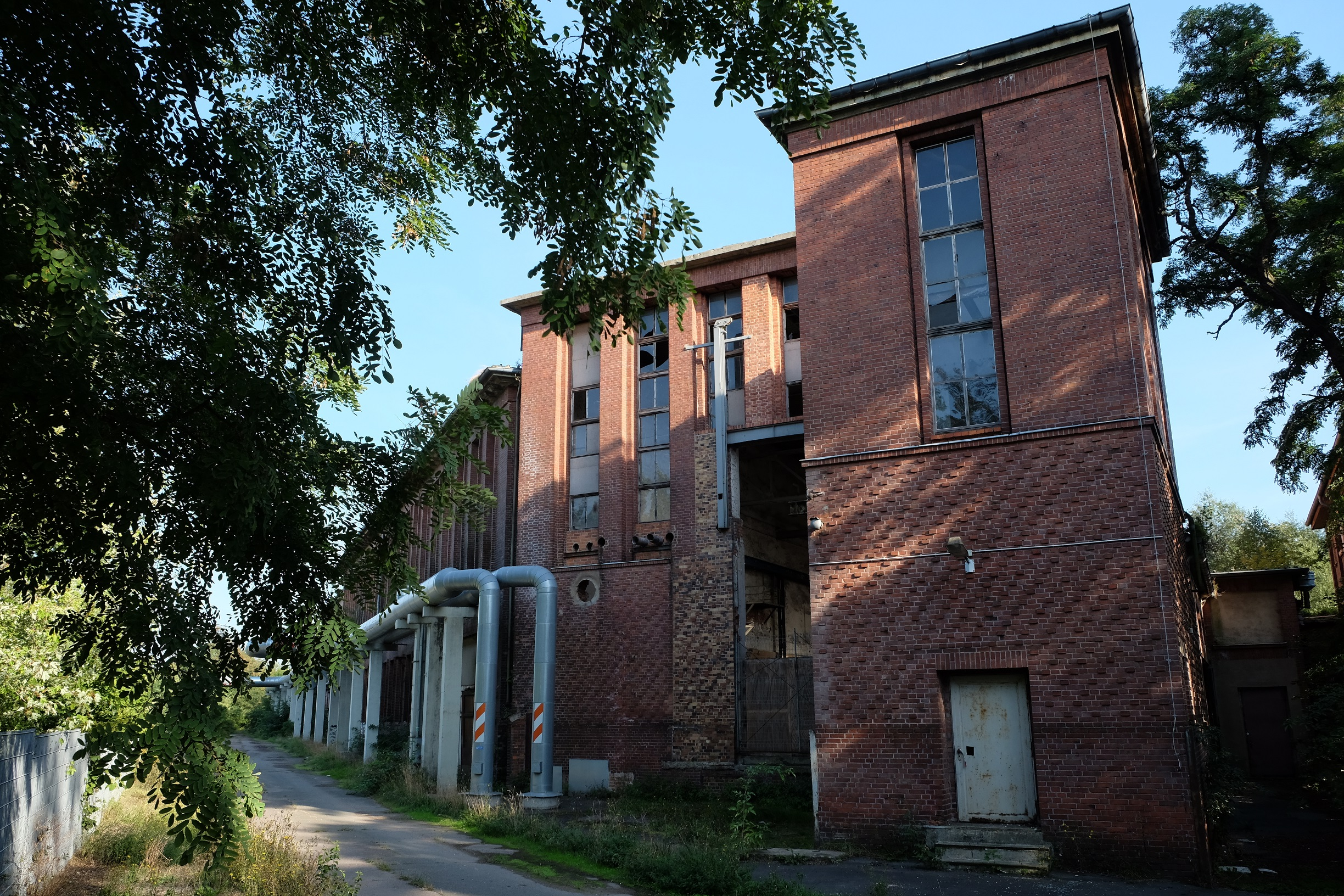 Erfurt-Gispersleben, Industriegebäude, Kraftwerk, Zittauer Straße 33. Der gesamte Gebäudekomplex wurde im Jahr 2016 komlett abgerissen.